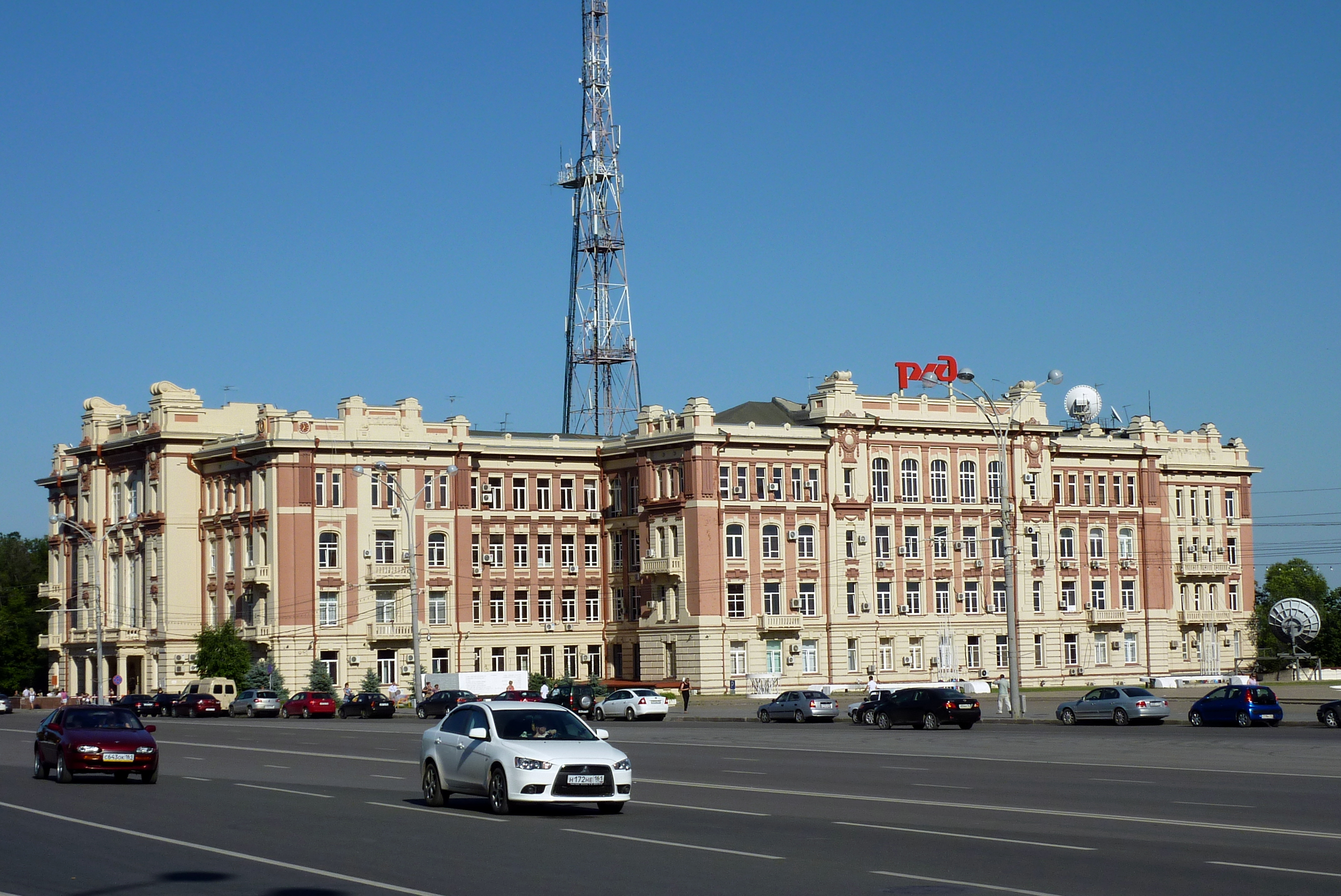 Здание управления Северо-Кавказской железной дороги (Театральная пл., 4)